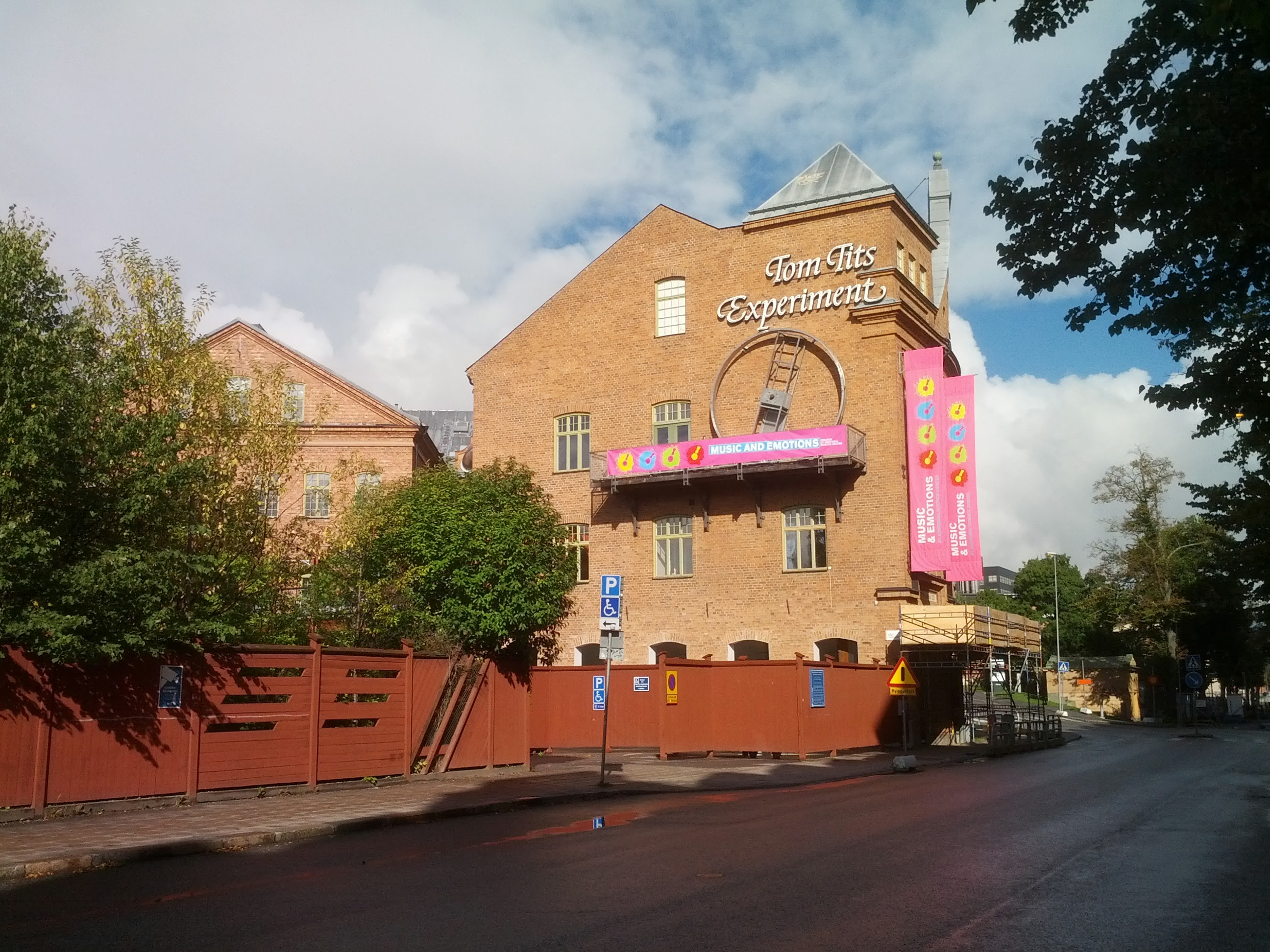 Tom tits experiment 2013